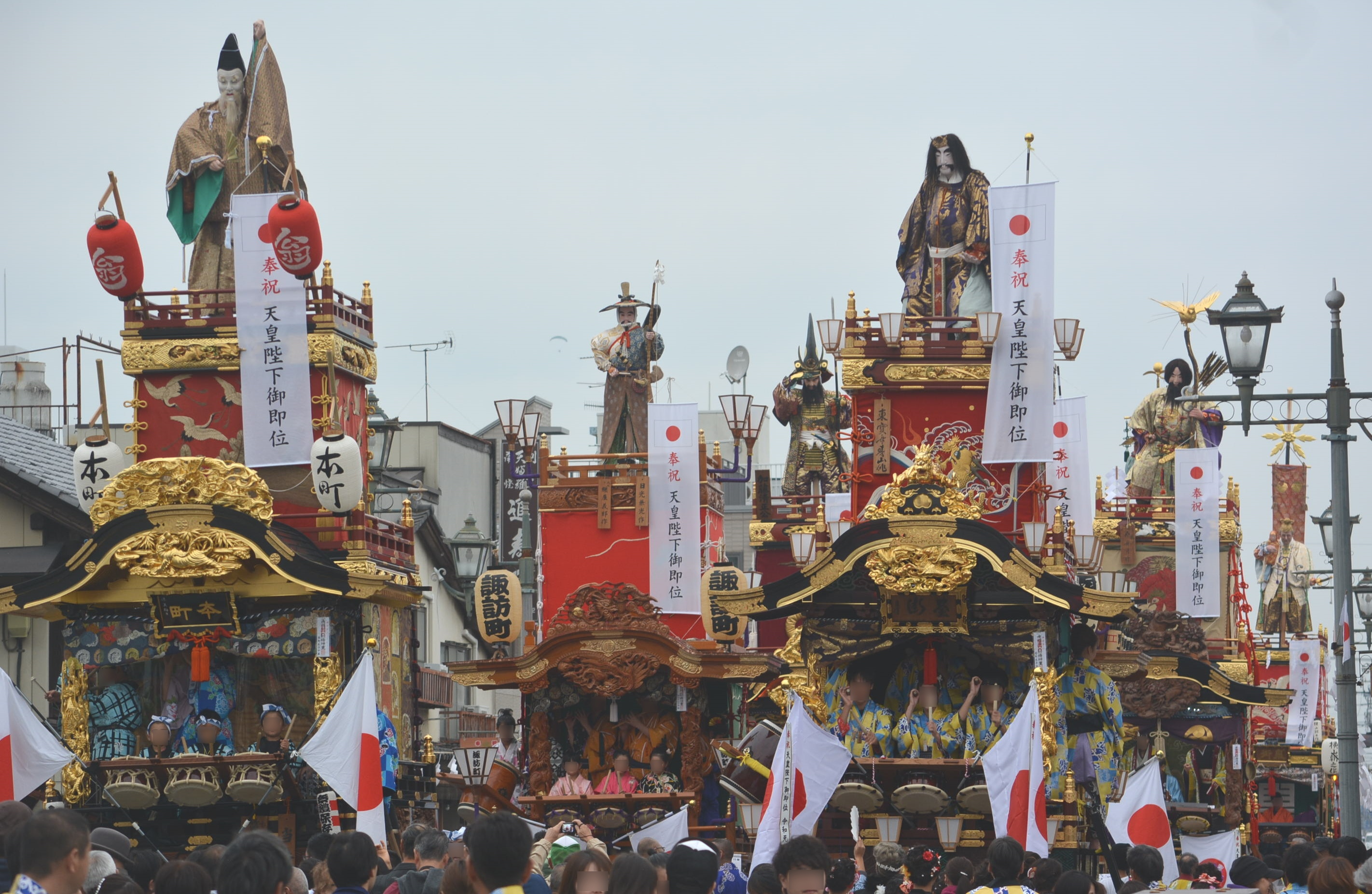 令和元年の本庄まつり